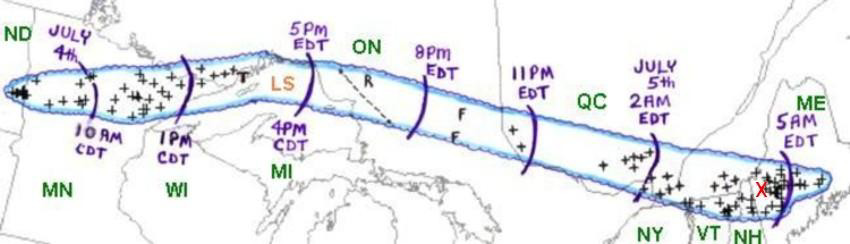 Tracé du derecho du 4 au 5 juillet 1999. Les + sont des rapports de dommages et les F dommages aux forêts. T pour Thunder Bay (Ontario). Les heures de passage sont en temps local et les États/provinces sont indiqués par deux lettres en vert.